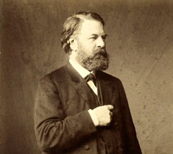 Portret van dr. Johann Georg Mezger, rond 1880-1885. J.G. Mezger (Amsterdam, 22 augustus 1838 - Parijs 3 maart 1909) was een Nederlands arts en masseur. Deze Amsterdamse slagerszoon wordt beschouwd als een van de grondleggers van de fysiotherapie.